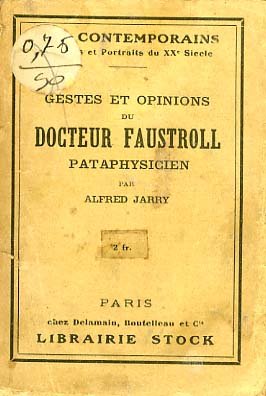 Vorderseite der ersten Gesamtausgabe der “Heldentaten und Ansichten des Doktor Faustroll, 'Pataphysiker andere Versionen: keine